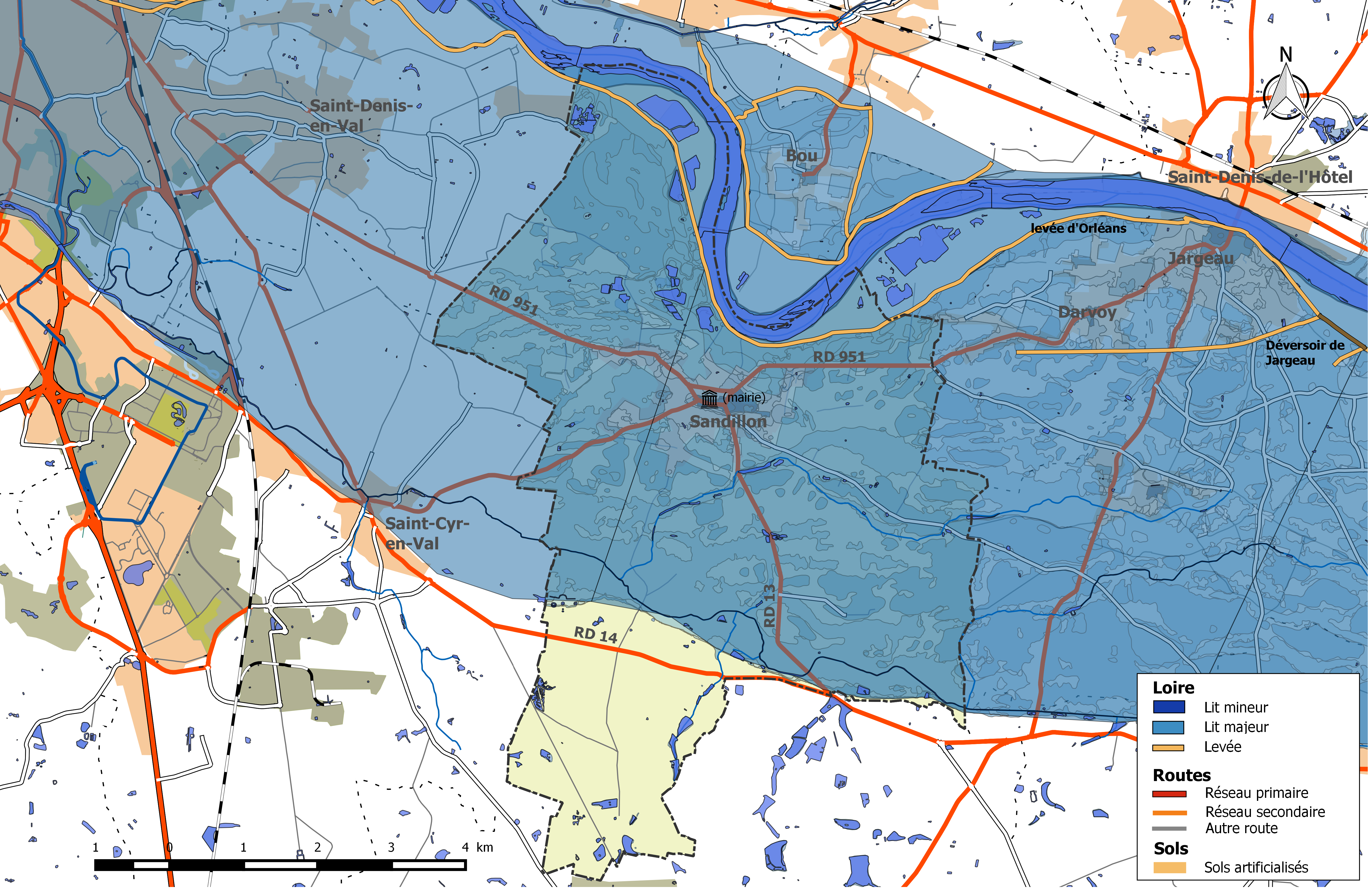 Zone inondable et réseaux hydrographique et routier de la commune de Sandillon.